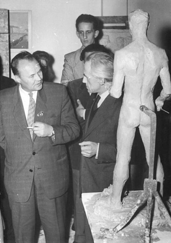 Berlin-Weißensee, Nikolai Tomski, Heinrich Drake Zentralbild Weiß 10.11.1953 Sowjetische Künstler in der Hochschule für bildende Kunst in Berlin-Weißensee Am 10.11.1953 besuchten die sowjetischen Künstler: Prof. B.W. Johanson, Volkskünstler der UdSSR, ordentliches Mitglied der Akademie der Künste der UdSSR, Dokter der Kunstwissenschaft, Prof. am Institut für Malerei, Bildhauerei und Architektur "Repin", Direktor der Staatlichen Tretjakow-Galerie und Stalinpreisträger, Prof. Wassilij Jefamow, ordentliches Mitglied der Akademie der Künste der UdSSR, Sekretär des Verbandes der sowjetischen Künstler, Prof. für Malerei am Moskauer Staatlichen Surikow-Institut für Kunst, fünfmaliger Stalinpreisträger und Prof. Nikolaj Tomski, Bildhauer, Volkskünstler der RSFSR, ordentliches Mitglied der Akademie der Künste und Stalinpreisträger, die Hochschule für bildende Kunst in Berlin-Weißensee. UBz: Prof. Tomski (links) unterhält sich mit Prof. Drake von der Kunsthochschule Berlin-Weißensee. Abgebildete Personen: Drake, Heinrich Prof.: Bildhauer, DDR Tomski, Nikolai Prof.: Bildhauer, UdSSR